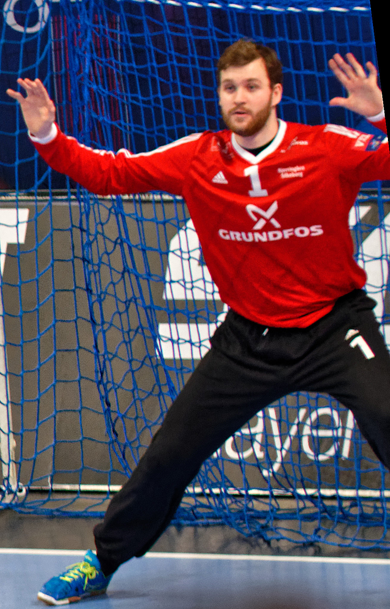 Rencontre de phase de groupe de la ligue des champions 2016-17 entre le PSG et Bjerringbro-Silkeborg. A Coubertin, le 11 février 2017.